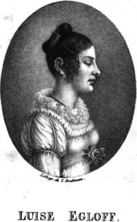 Luise Egloff, blinde Dichterin (1802-1834)